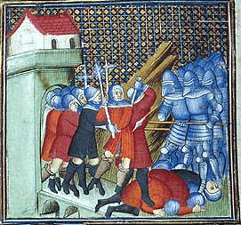 Jacquerie